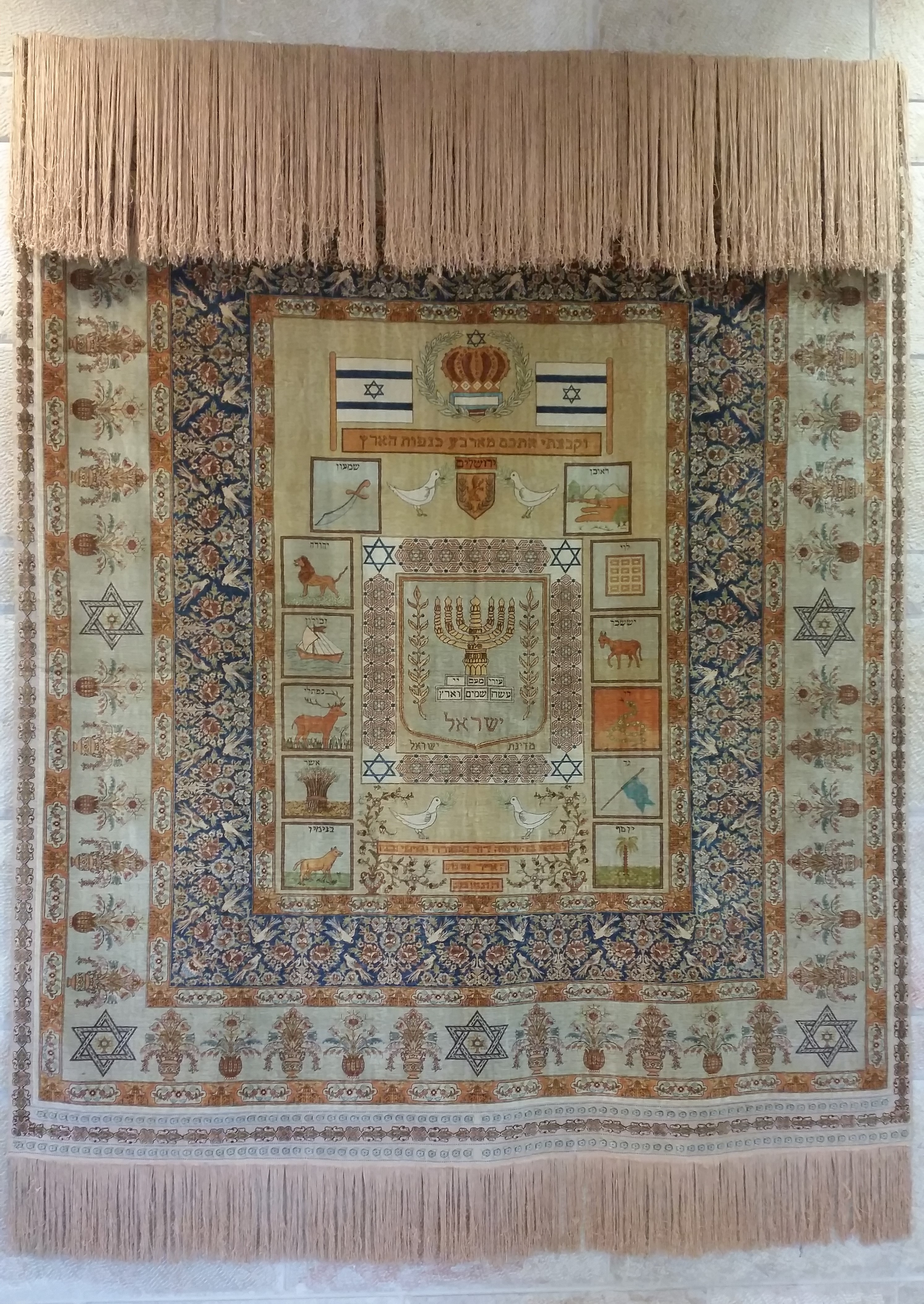 שטיח פרסי שניתן לכנסת ישראל בהקדשה מדוד וציפורה נסימי ובניו ליום העצמאות התשמ"ג. במרכז השטיח סמל המדינה - המנורה, עיטורי יוני שלום, דגלי ישראל וסמלי 12 השבטים